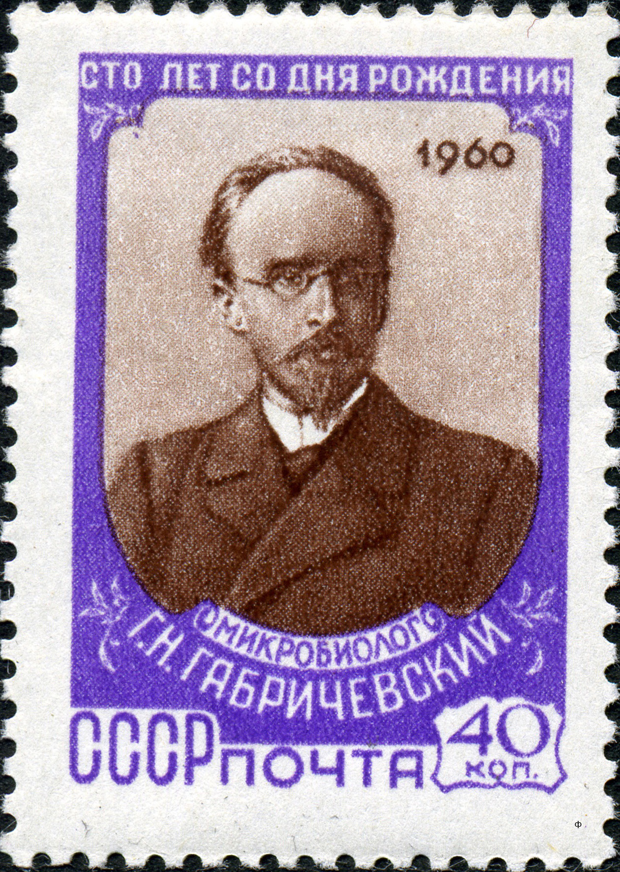 Марка СССР